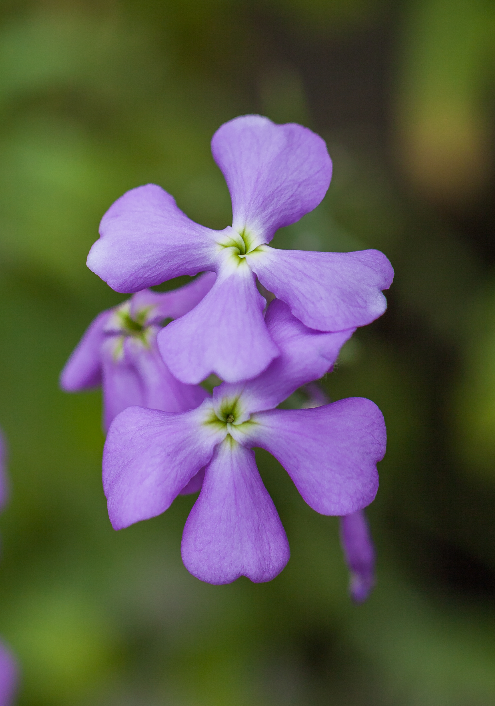 Matthiola maderensis, Jardín Botánico, Múnich, Alemania